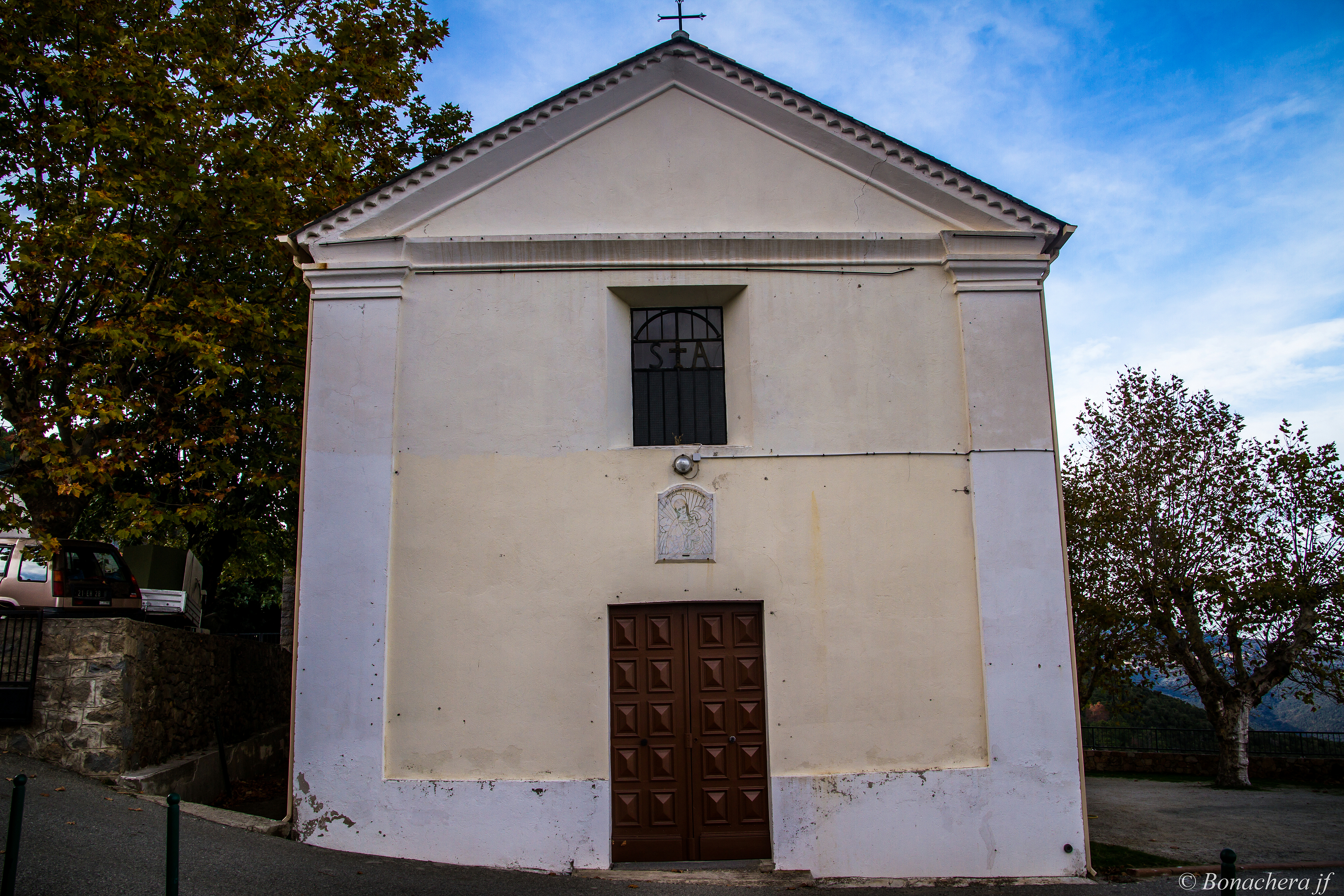 Solaro, Fiumorbo (Haute-Corse) - L'église Saint-Jean-Baptiste